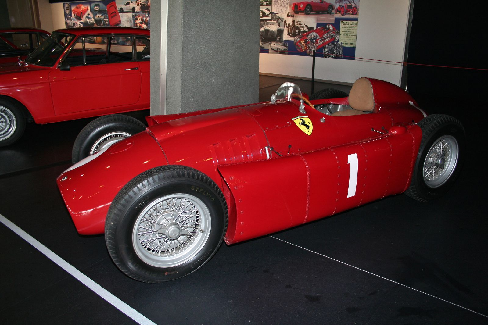 LANCIA D 50 del 1955